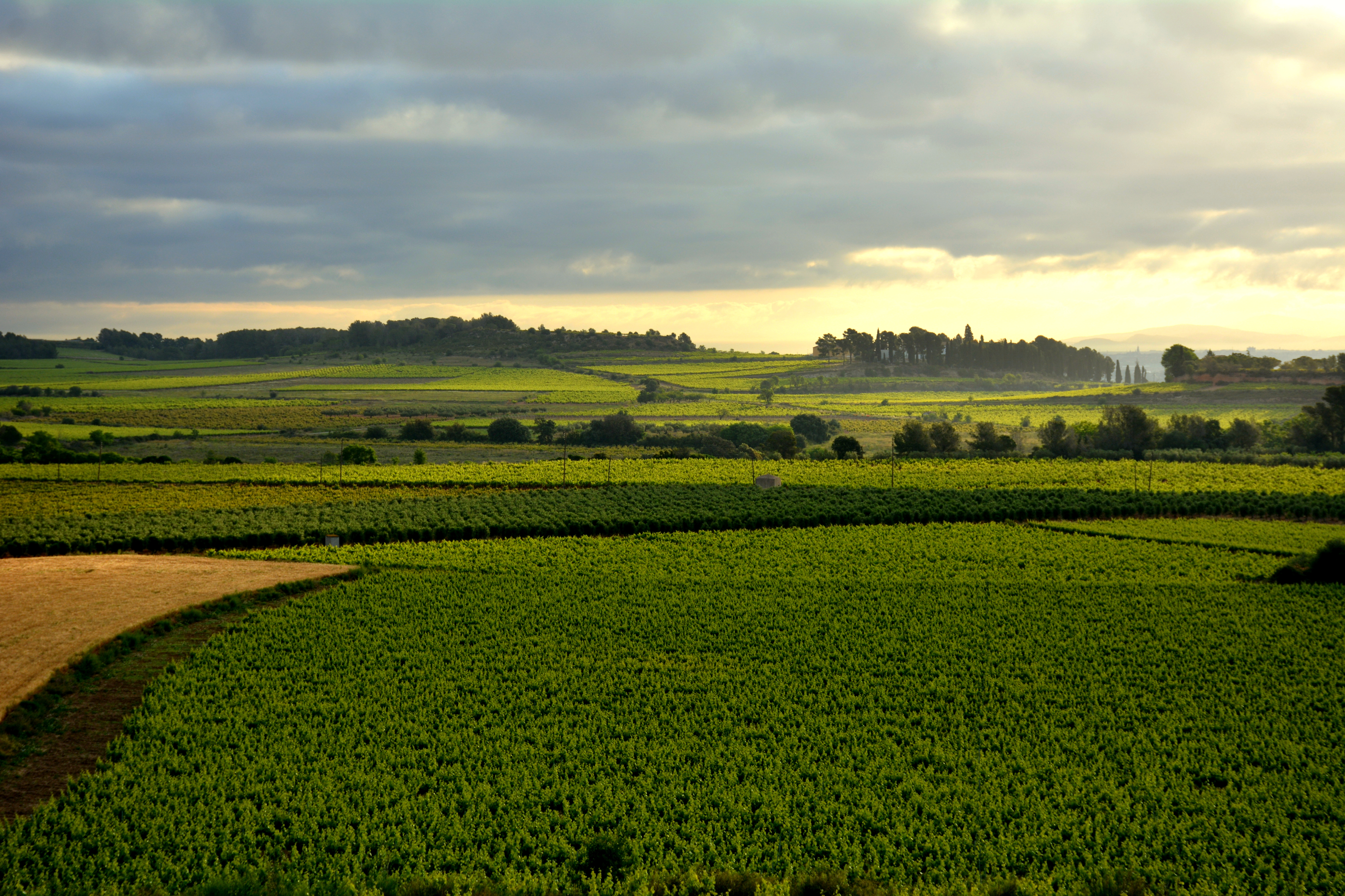 Vinyes de Sant Jaume dels Domenys, Baix Penedès